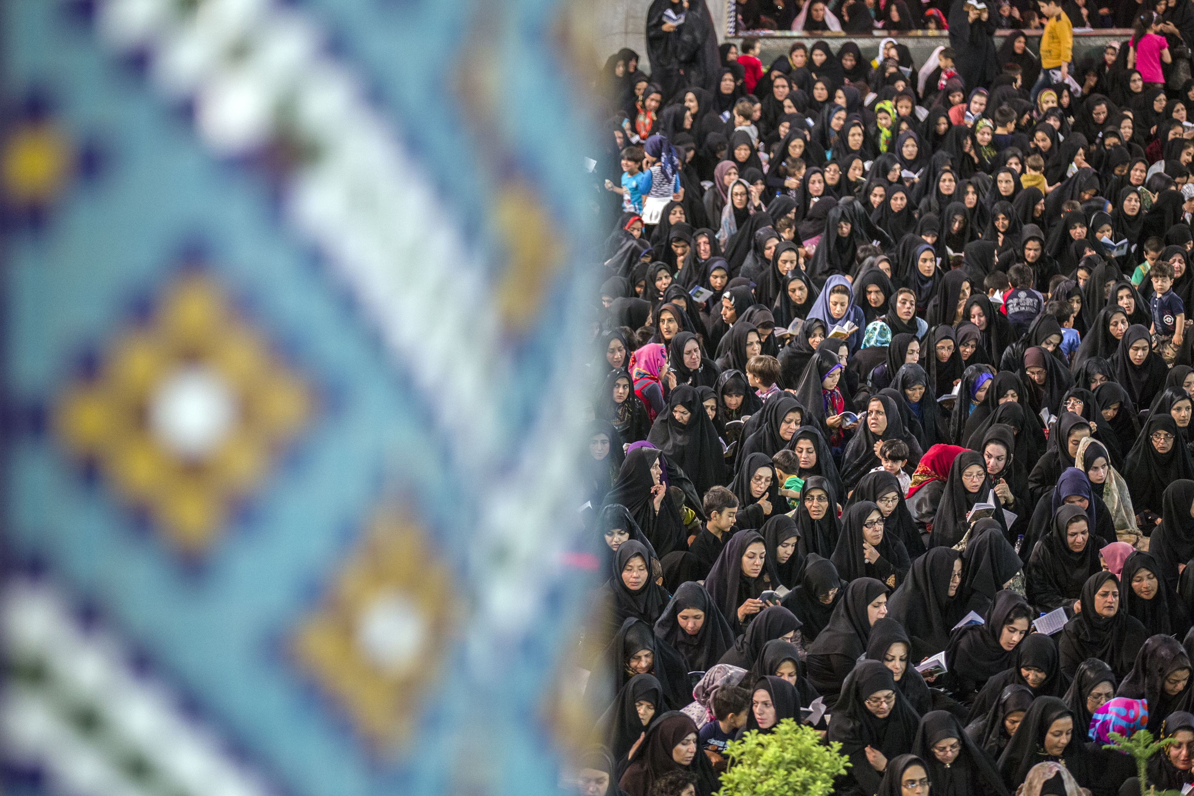 محمد اوسط مشهور به هلال علی و محمد هلال، (۱۴–۶۴ ه. ق)، فرزند بلافصل علی بن ابیطالب و نوه محمد می‌باشد.مقبره این امامزاده در شهرستان آران و بیدگل می باشد.